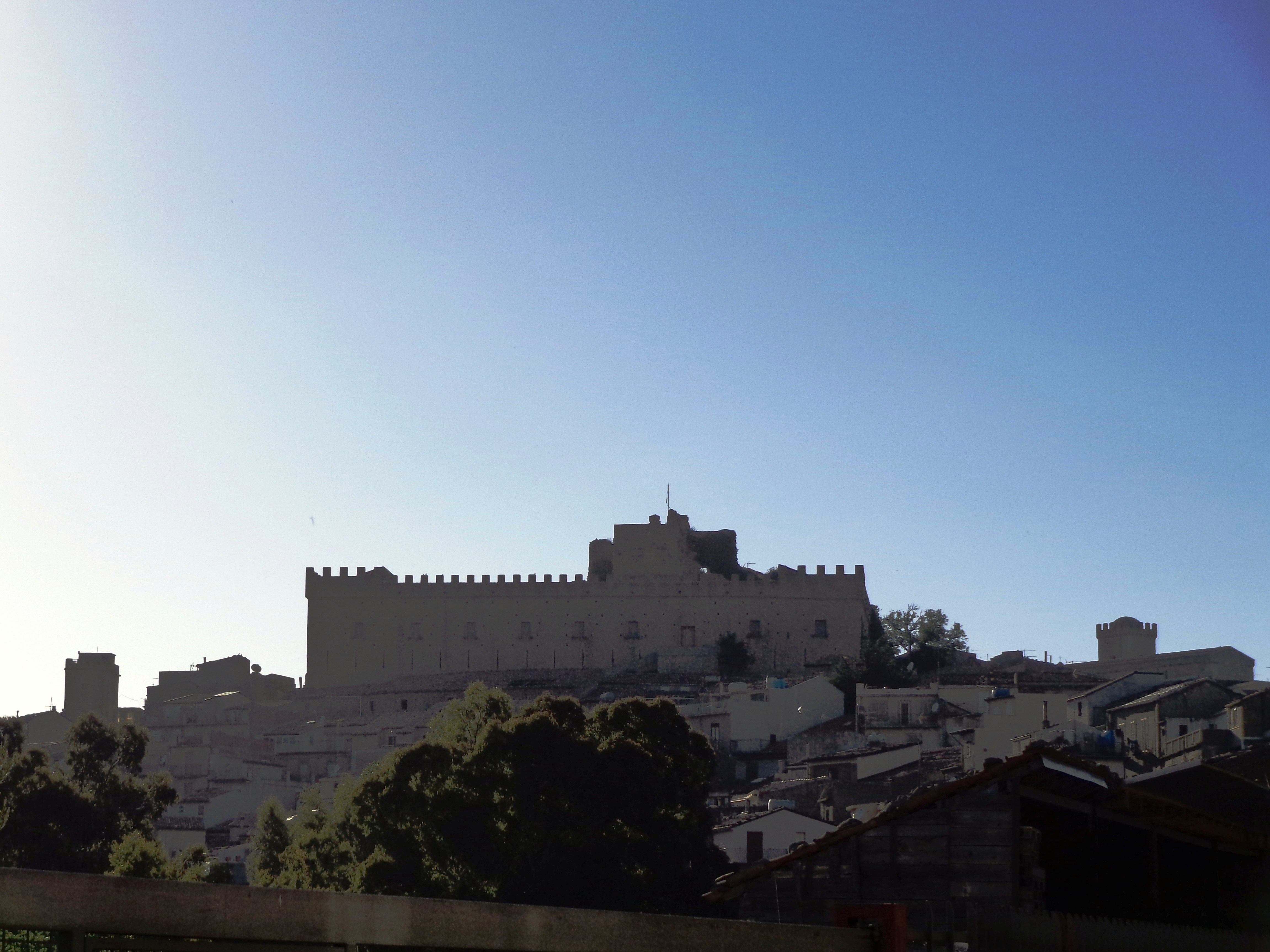 Castello di Montalbano Elicona lato est - Panorama